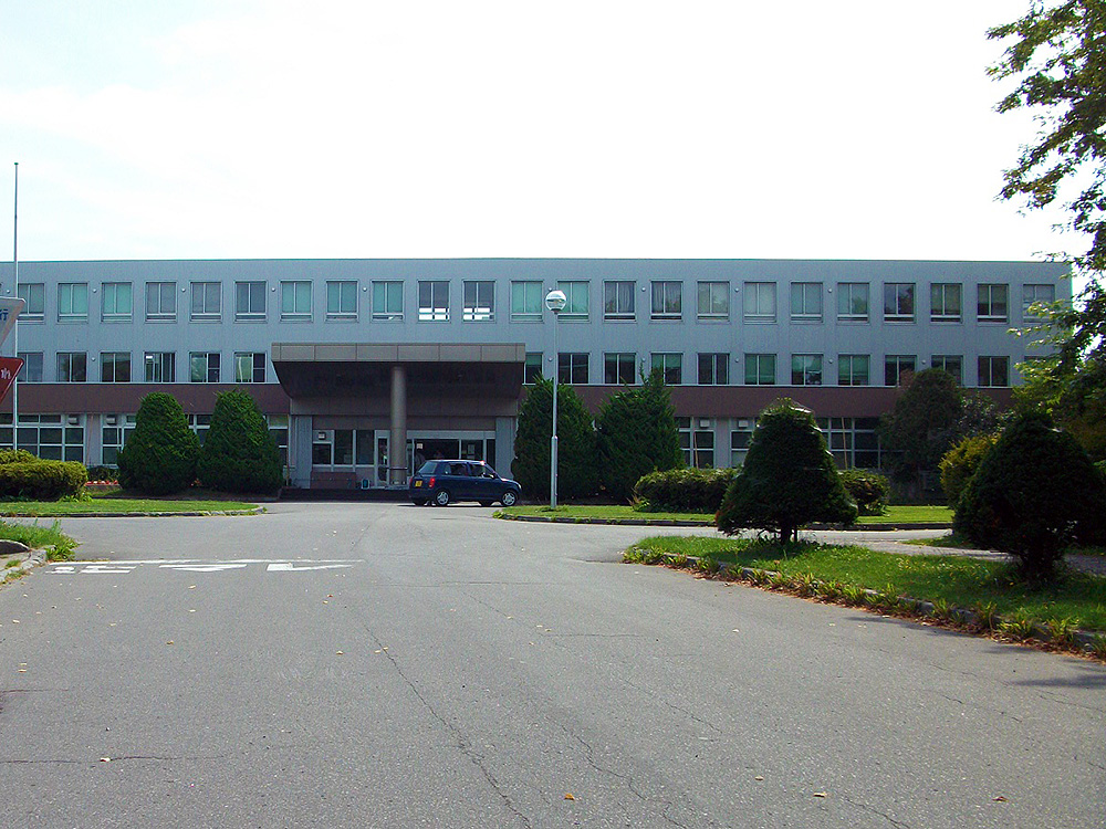 北海道教育大学函館校正門